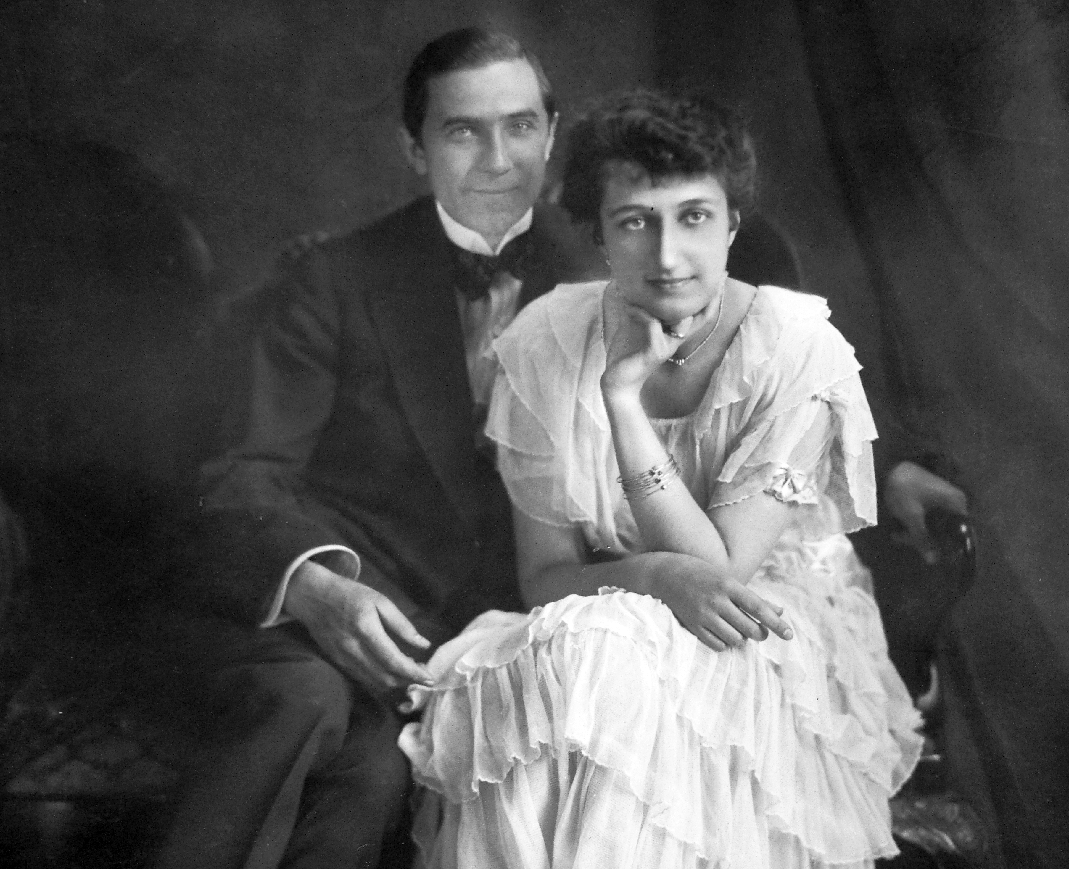 Lugosi Béla színművész és első felesége, Szmik Ilona. Location: Hungary Tags: celebrity Title: Lugosi Béla színművész és első felesége, Szmik Ilona.